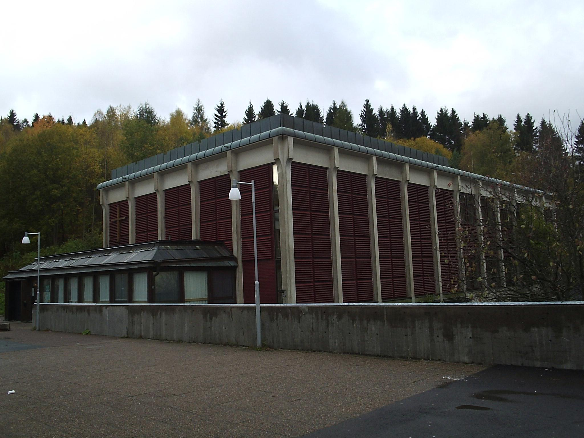 Bergsjöns kyrka, den 23/10. Bilden är fotograferad av Harri Blomberg.